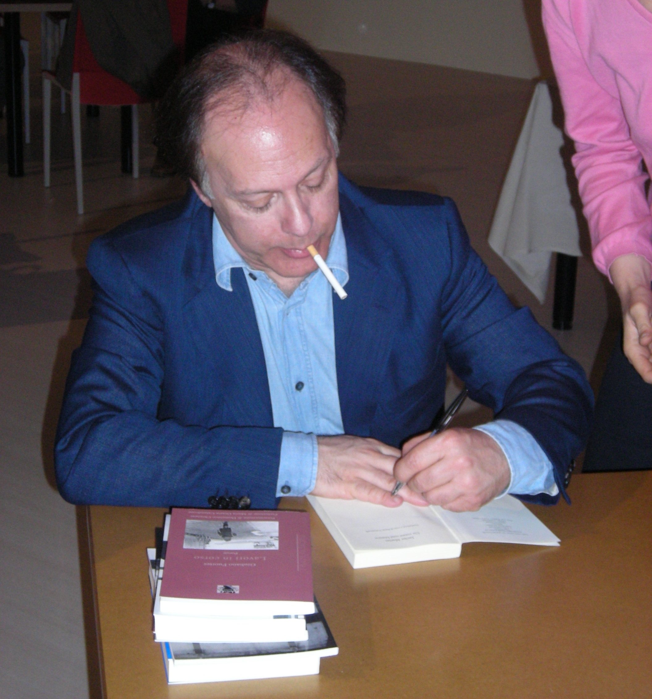 Javier Marìas alla Fiera del Libro di Torino(sabato 10 maggio 2008); foto di Vito Vita